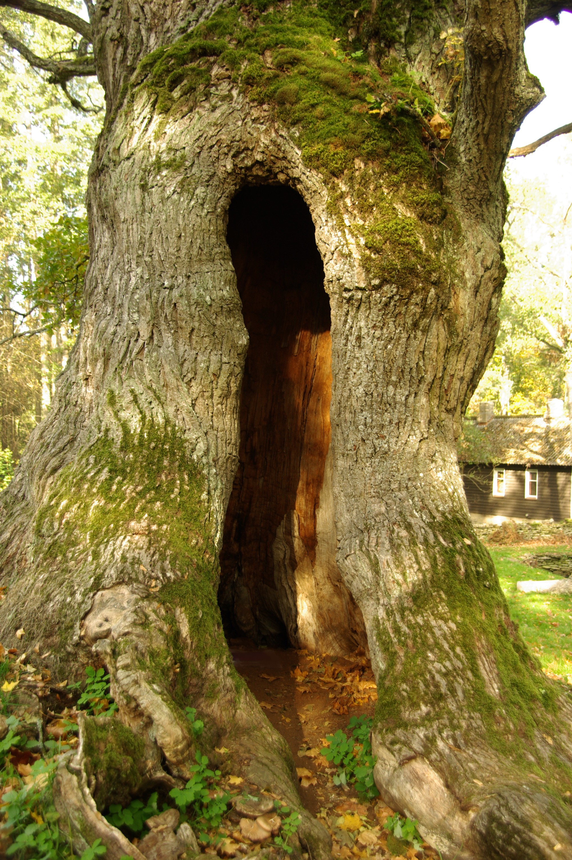 Asub Kuusalu vallas Allika külas.Põline hiiepuu